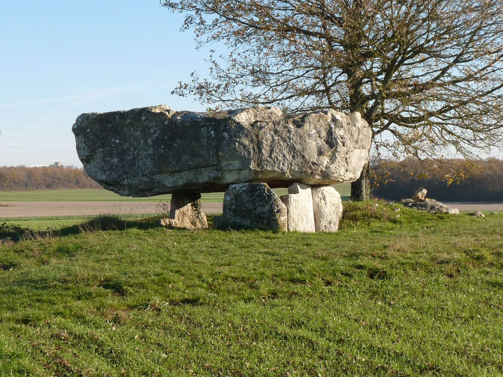 dolmen de la Petite Pérotte, Fontenille, Charente, France